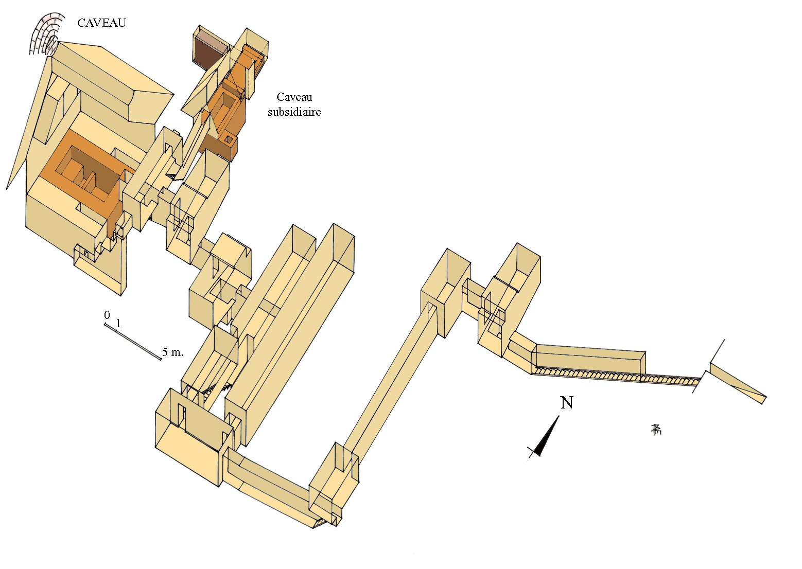 Vue axonométrique des appartements funéraires de la pyramide inachevée de Saqqarah sud